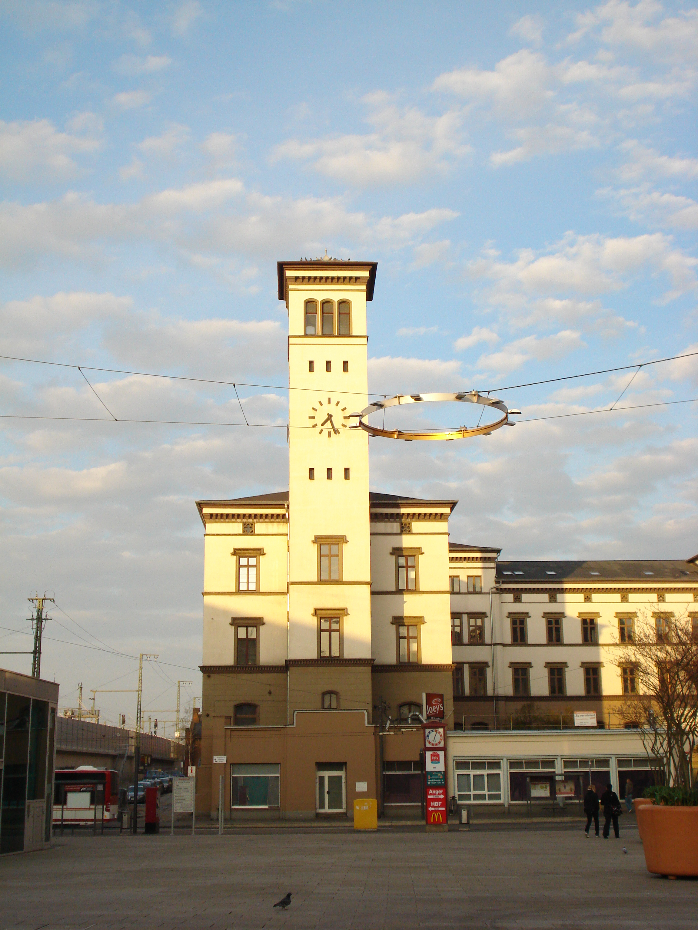 Nádraží v Erfurtu, Německo